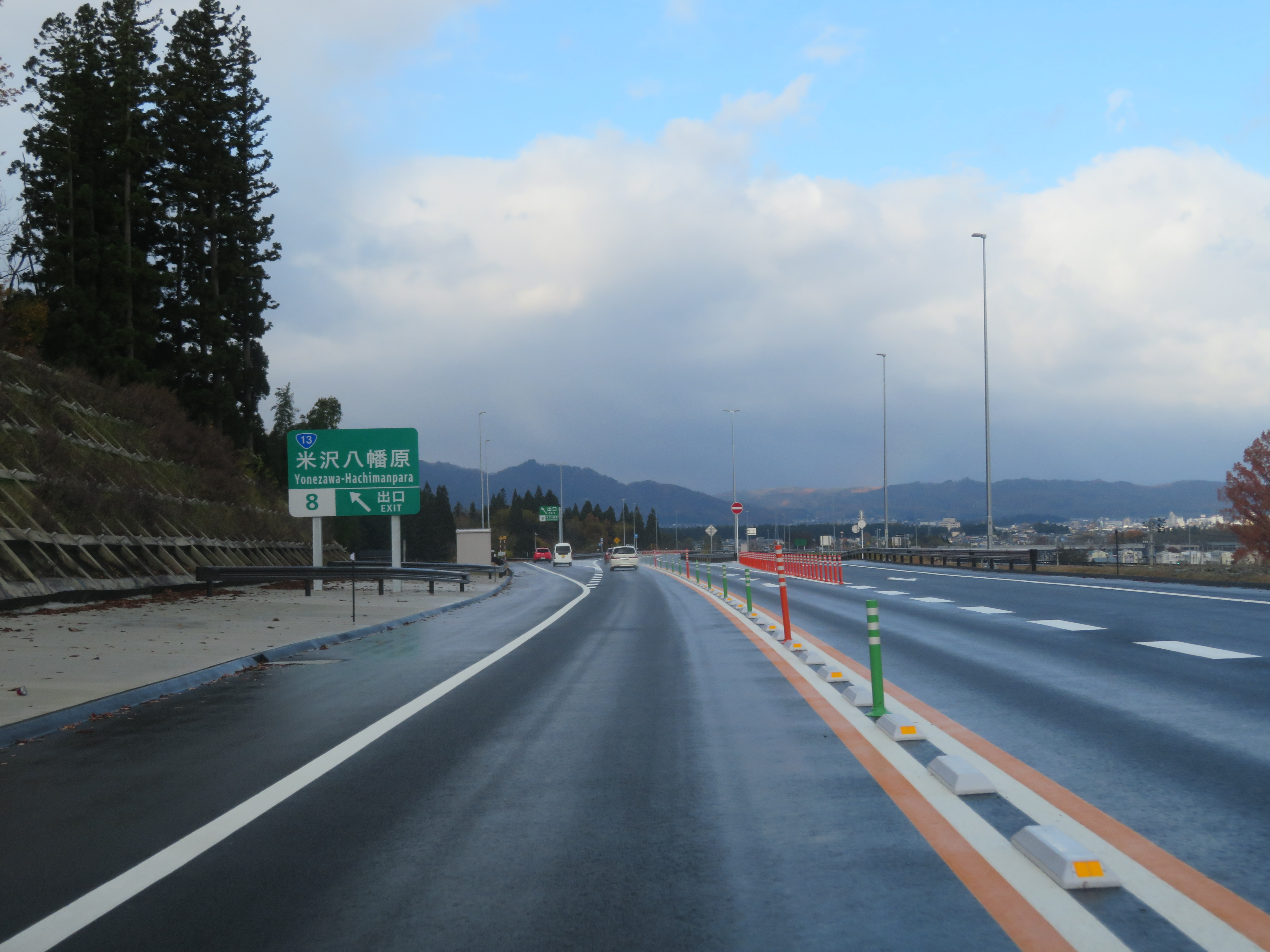 東北中央自動車道米沢八幡原IC出口付近（福島JCT方面側から撮影）